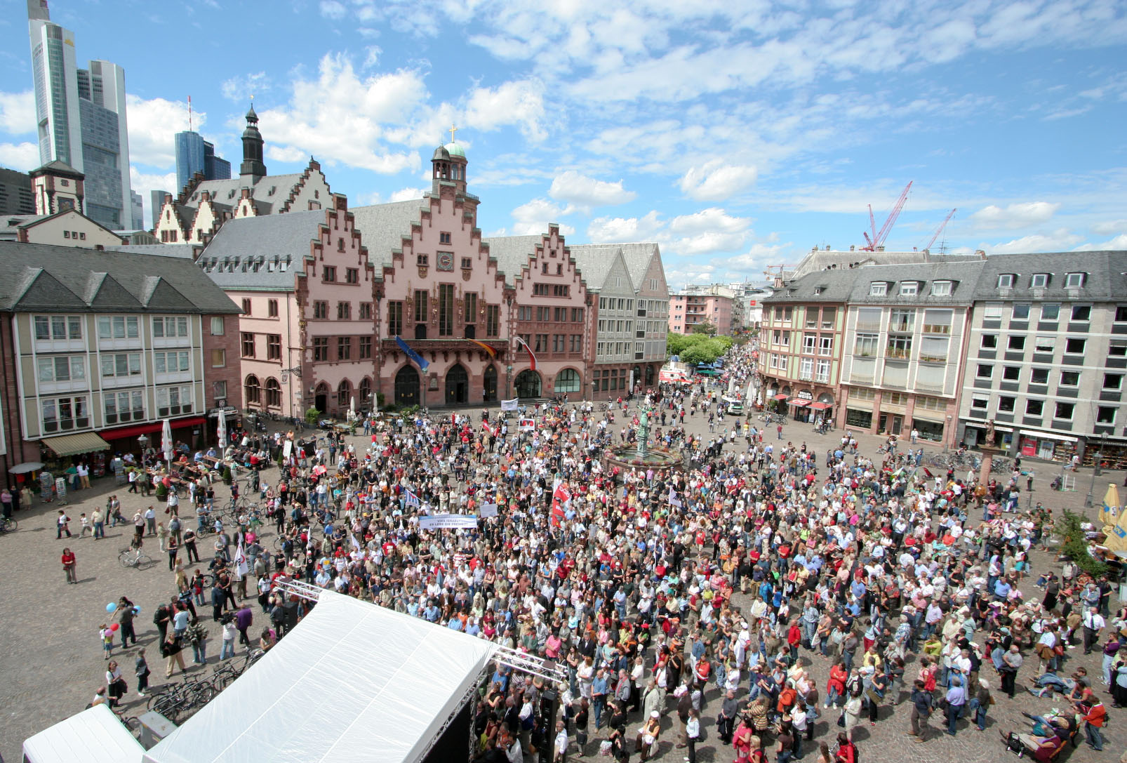 Kundgebung gegen die NPD-Demo in Frankfurt (Main) am 7. Juli 2007. Menschen auf dem Frankfurter Römerberg